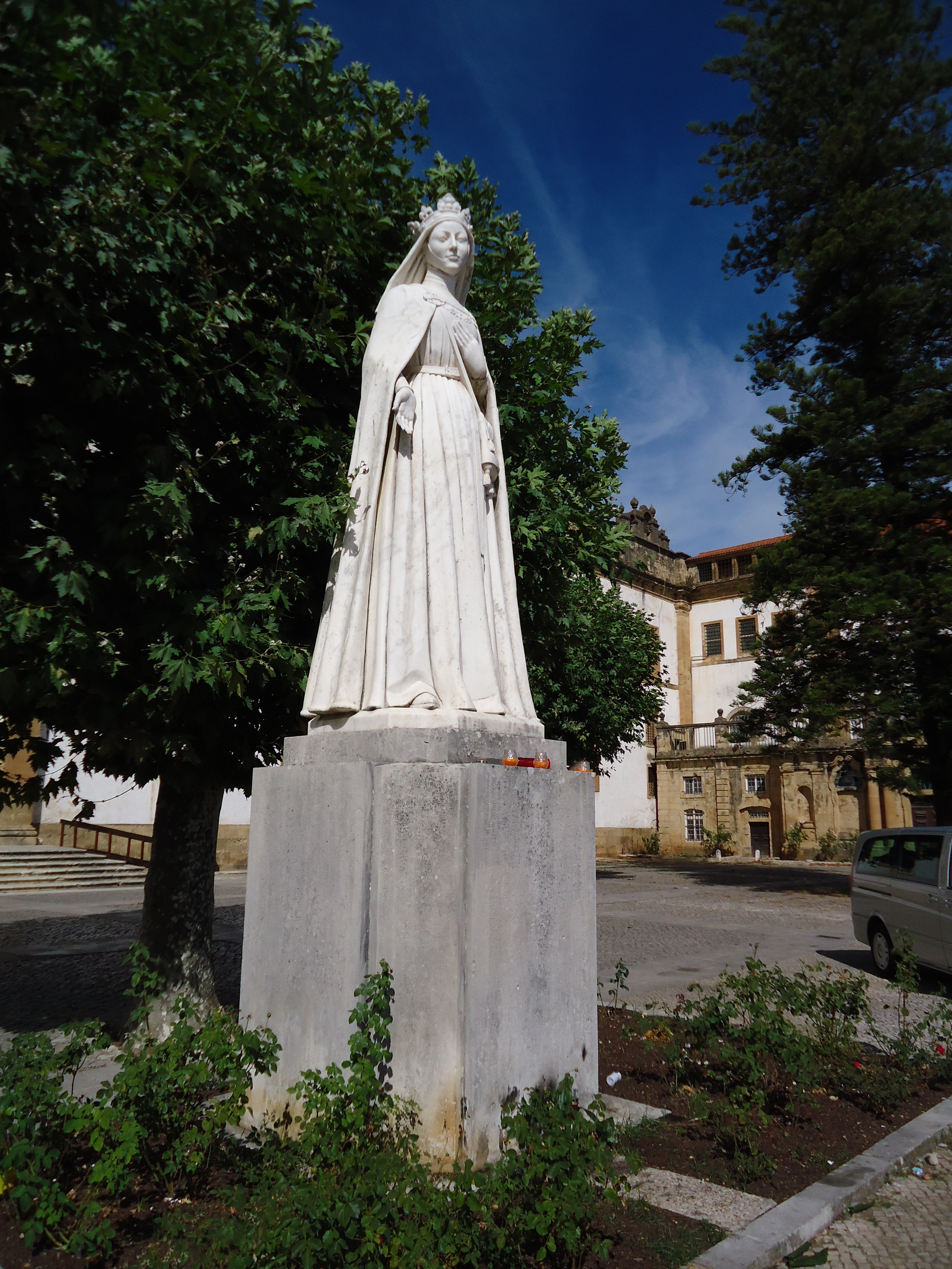 Convento de Santa Clara-a-Nova, freguesia de Santa Clara, cidade, concelho e distrito de Coimbra, Portugal: estátua da rainha Santa Isabel, de autoria de Álvaro de Brée.